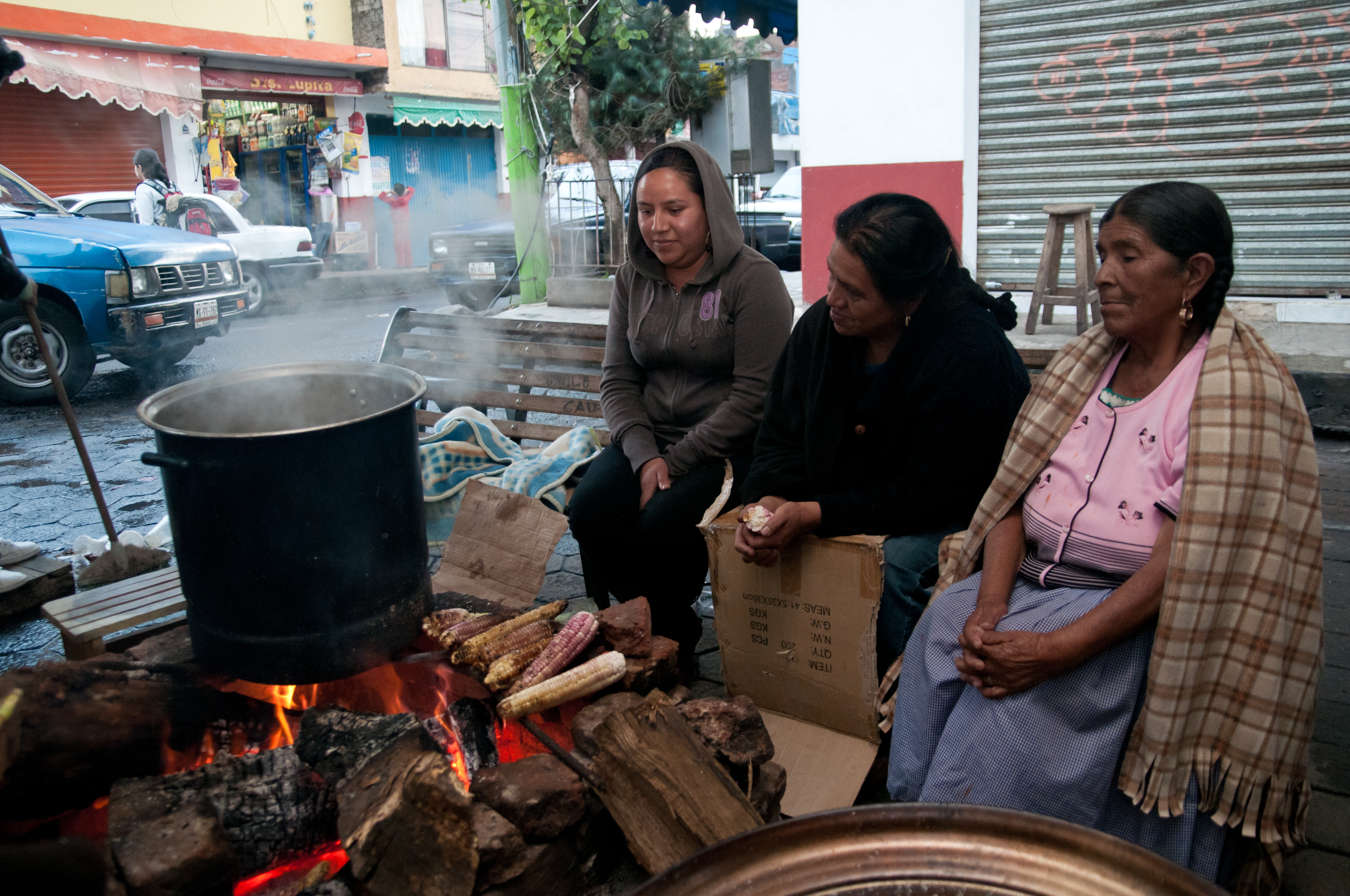 Cherán es hoy un pueblo que busca gobernarse a sí mismo. La asamblea popular, que sustituye las funciones del alcalde, ya mandó decir a las autoridades electorales que en noviembre no habrá comicios partidistas, pues ellos elegirán solos a sus gobernantes. Las escuelas están cerradas y los maestros de la comunidad ya se organizan para hacer reanudar las clases. A falta de síndico (hay uno que no ejerce), formaron un consejo de honor y justicia. Su prioridad, sin embargo, es la seguridad. Por eso construyeron 200 barricadas por distintos lados de la localidad y crearon la llamada "ronda comunitaria", que tiene la consigna de estrechar la vigilancia, calle por calle, en los cuatro barrios en que se divide la población. Texto de Daniela Pastrana tomado de: Más fotos en esta presentación en Youtube: Ayuda a Cherán